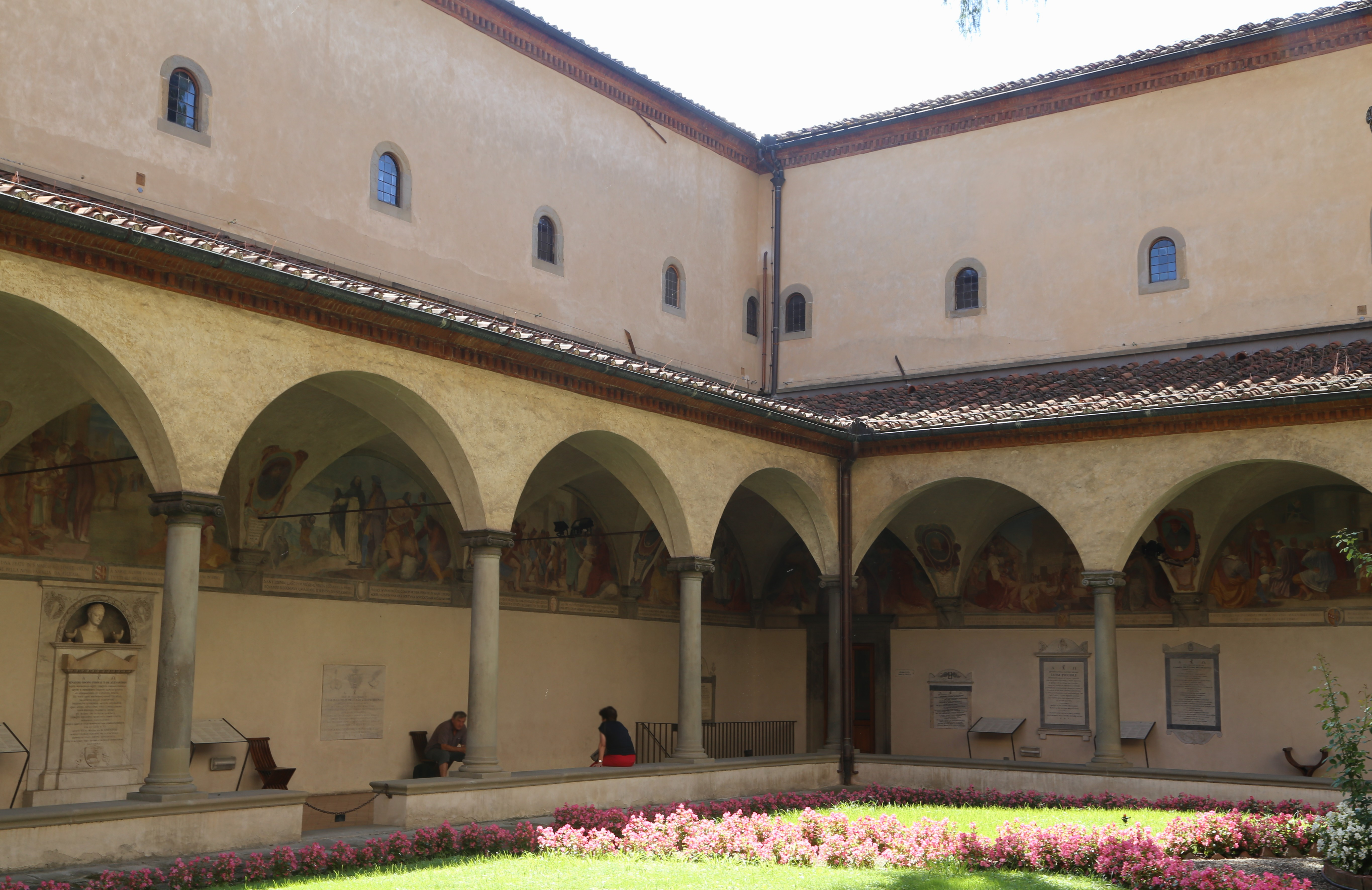 San Marco, Florenz